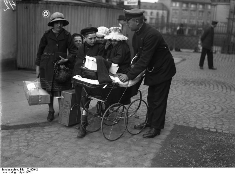 Die Massenvertreibung deutscher Eisenbahner aus dem Ruhrgebiet wegen Nichtbefolgung französischer Befehle. Ausgewiesener Eisenbahner mit dem letzten Rest seiner Habe nach mehrstündigem Marsch in Limburg a/Lahn.